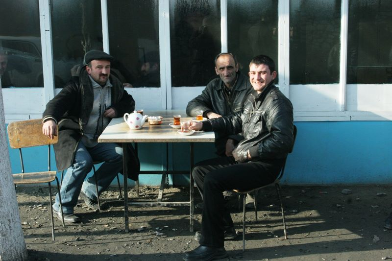 Nidż (Nic, Nij), miejscowość zamieszkana głównie przez chrześcijańskich Udinów (Udynów).